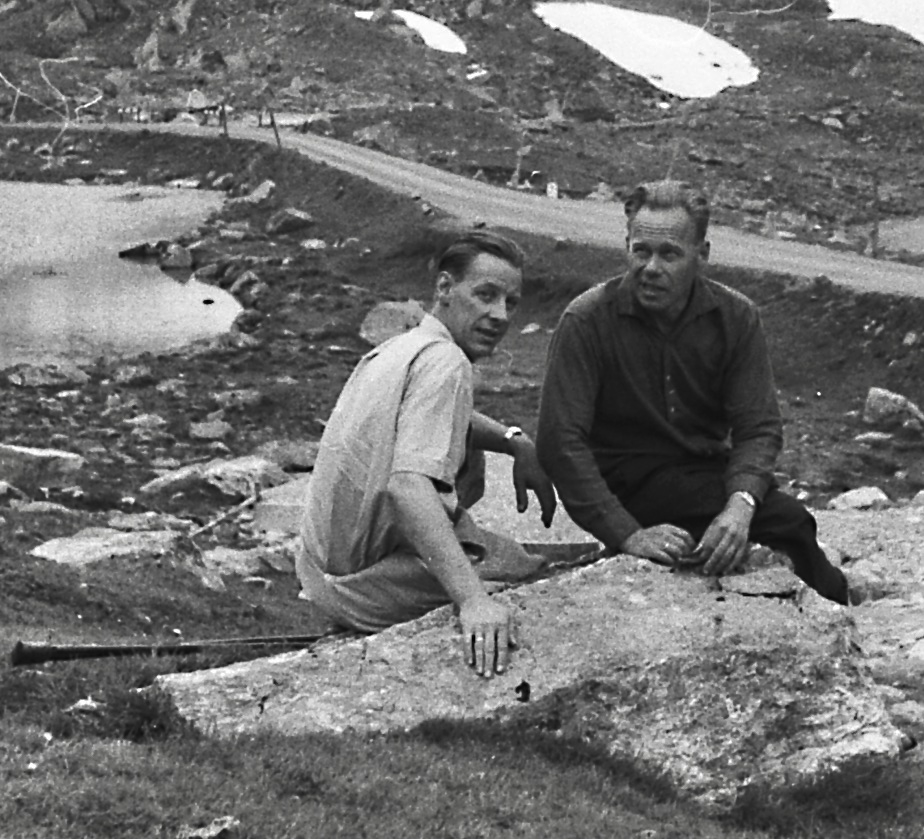 Der deutsche Fotograf und Kameraasisstent Arnold Ernst Fanck (1919–1994) und der Filmregisseur und Produzent Fritz Aly